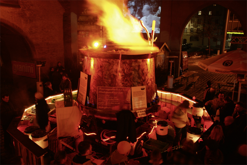 Die größte Feuerzangenbowle der Welt (Isartor; rechts im Bild: Lueg ins Land)